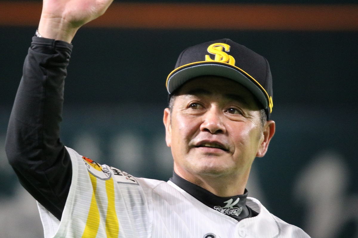 2017/11/4日本シリーズ第6戦にて